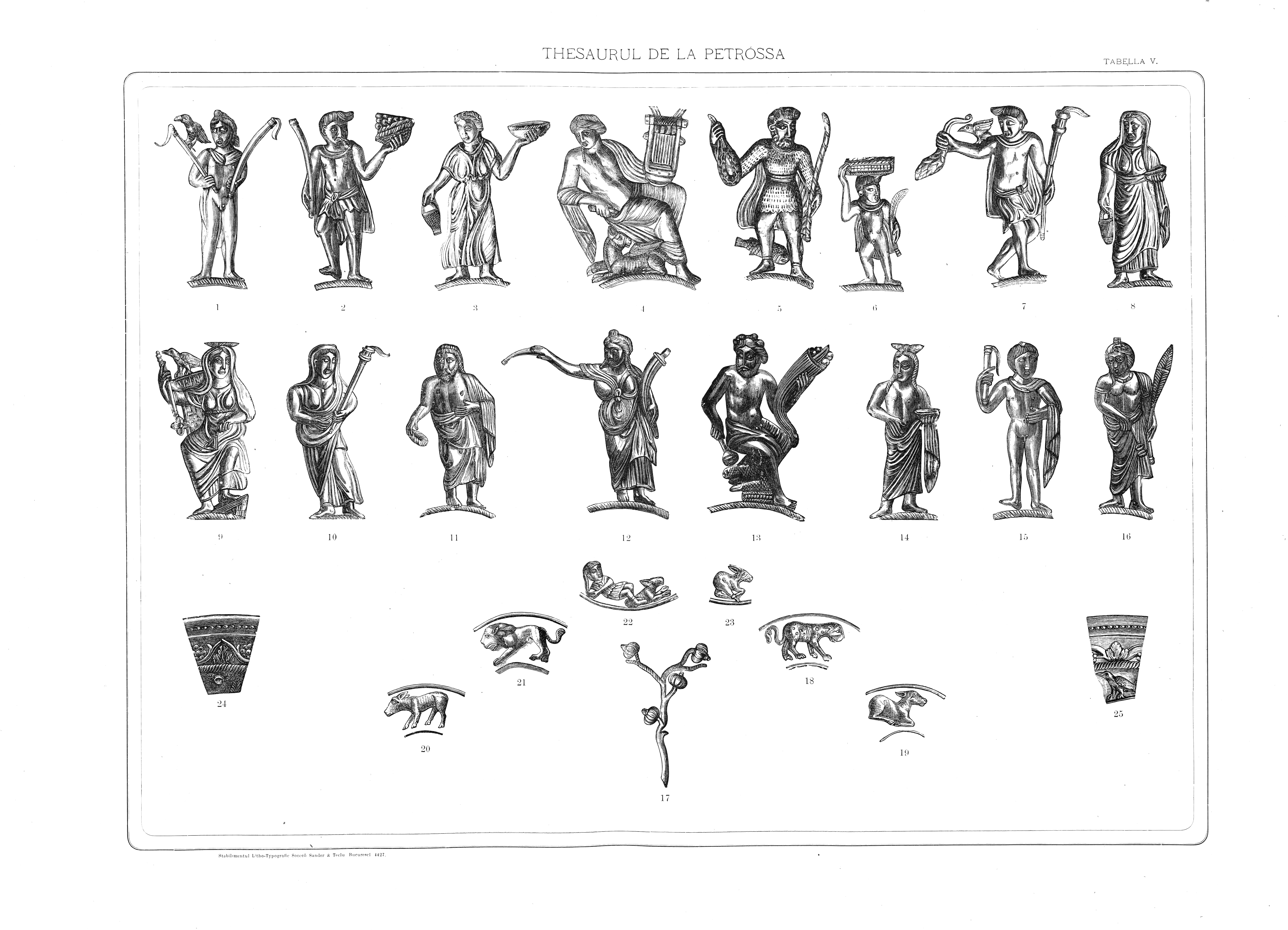 Sinia sau patera - simboluri, formată din doua lame, una externă mai groasă și netedă și alta internă cu mai multe chipuri și ornamente în stil greco-roman. Sub un ornament în formă de viță de vie, care merge de jur-împrejurul vasului, se vede o serie de 15 figuri așezate în cerc, cu picioarele rezemate de un ornament central în care se văd: un cioban culcat, un câine, un măgărus, un leu, doi rnăgari și un leopard, în diferite pozițiuni. La mijloc este o statue mică care represintă o femee șezând și ținând în mâini o cupă conică (catathus). Aceasta din urmă ar representa pe zeița Freya sau Frigga, după Odobescu, pe Jordh sau Hertha (Pământul, Cybela), după d-l de Linas. Celelalte figuri, ar representa alte divinități ale unui panteon eleno-barbar și anume, luându-le de la stânga. la dreapta cititorului și începând cu tânărul imberb care ține în mâna stângă o lira : 1. Balder, fiul lui Odin. 2. Aegir, zeul apelor. 3. Fosit, fiul lui Balder. 4. Tyr, zeul răsboiului. 5, 6 si 7. Cele trei Norne (Farce). 8. Soeter. 9. Freya. 10. Odin sau Wodan. 11. Thor, zeul tunetului. 12. Hela, zeița morții. 13 si 14. Castor și Pollux. 15. Freyr, zeul păcii și al abondenței. 16. Ostara, zeița primăverei.